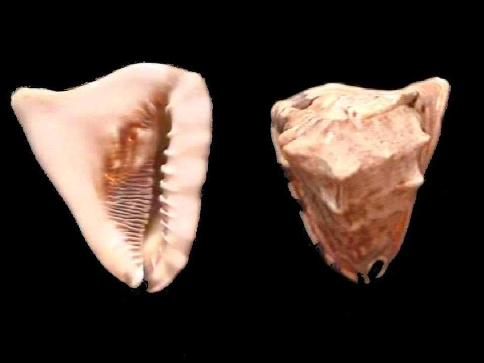 Cassis tuberosa del Archipiélago Los Roques, Dependencias Federales - Venezuela.